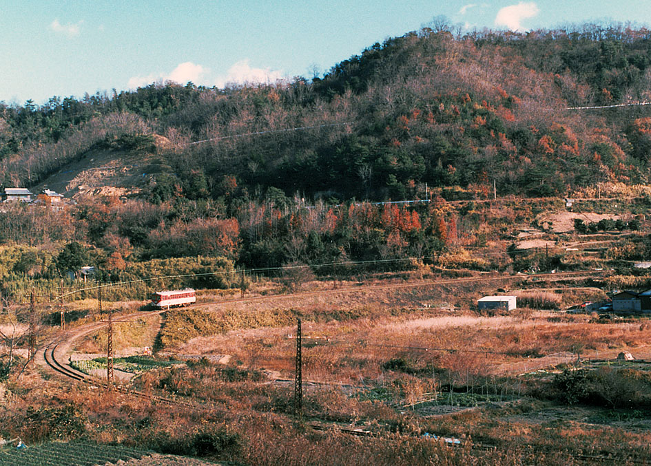 下津井電鉄線 モハ1001 東下津井－下津井間